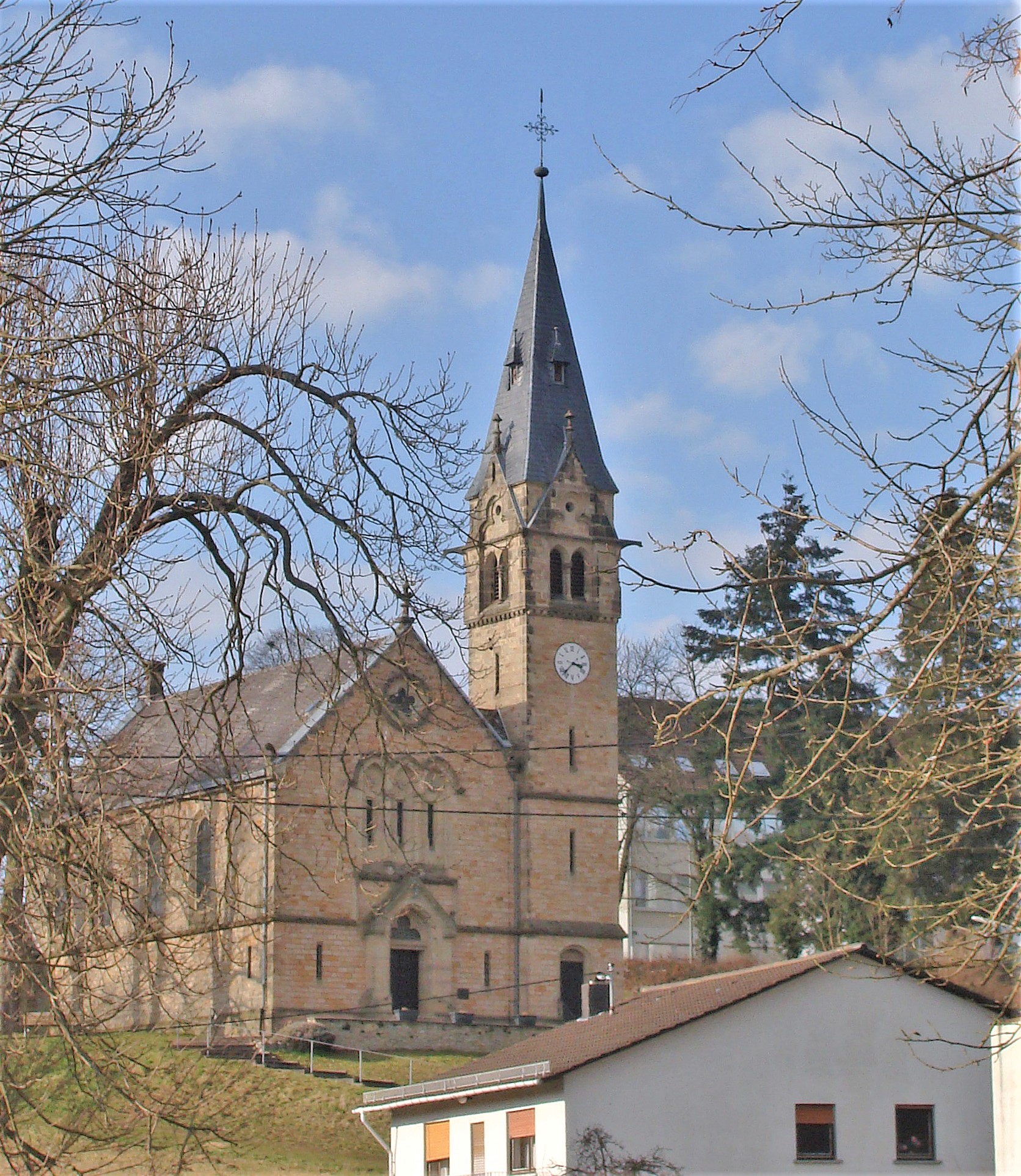 église de Karlsbrunn, Ortsteil de Großrosseln en Sarre (Saarland).